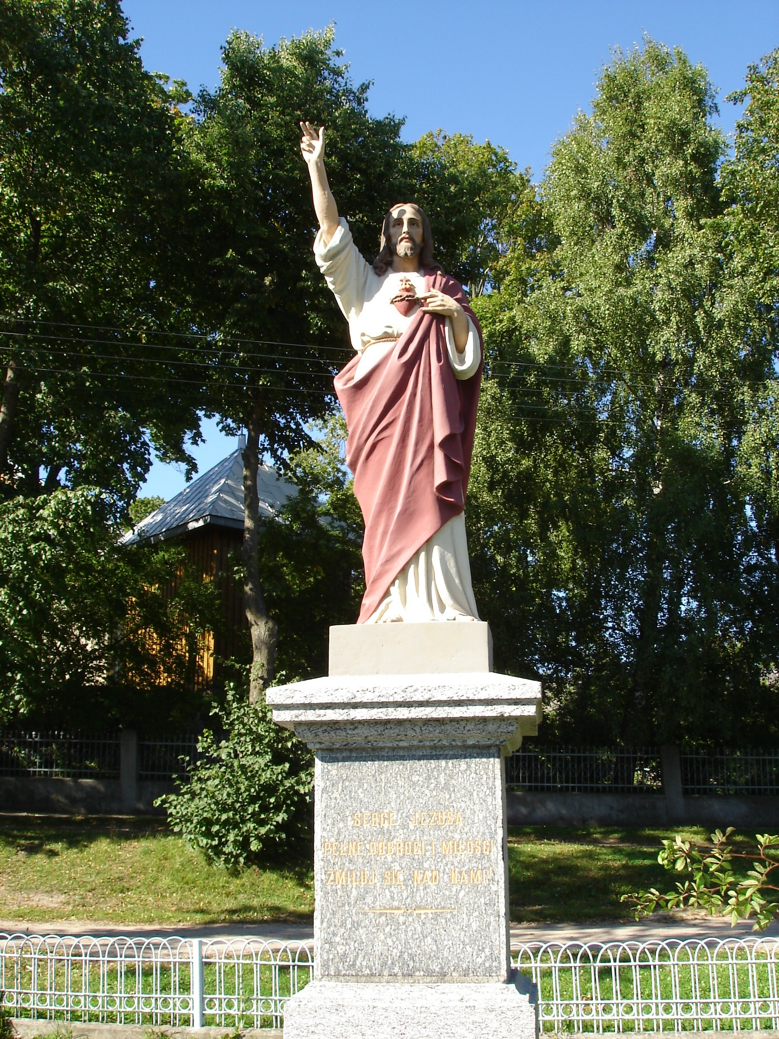 Pomnik przy kościele w Wiżajnach